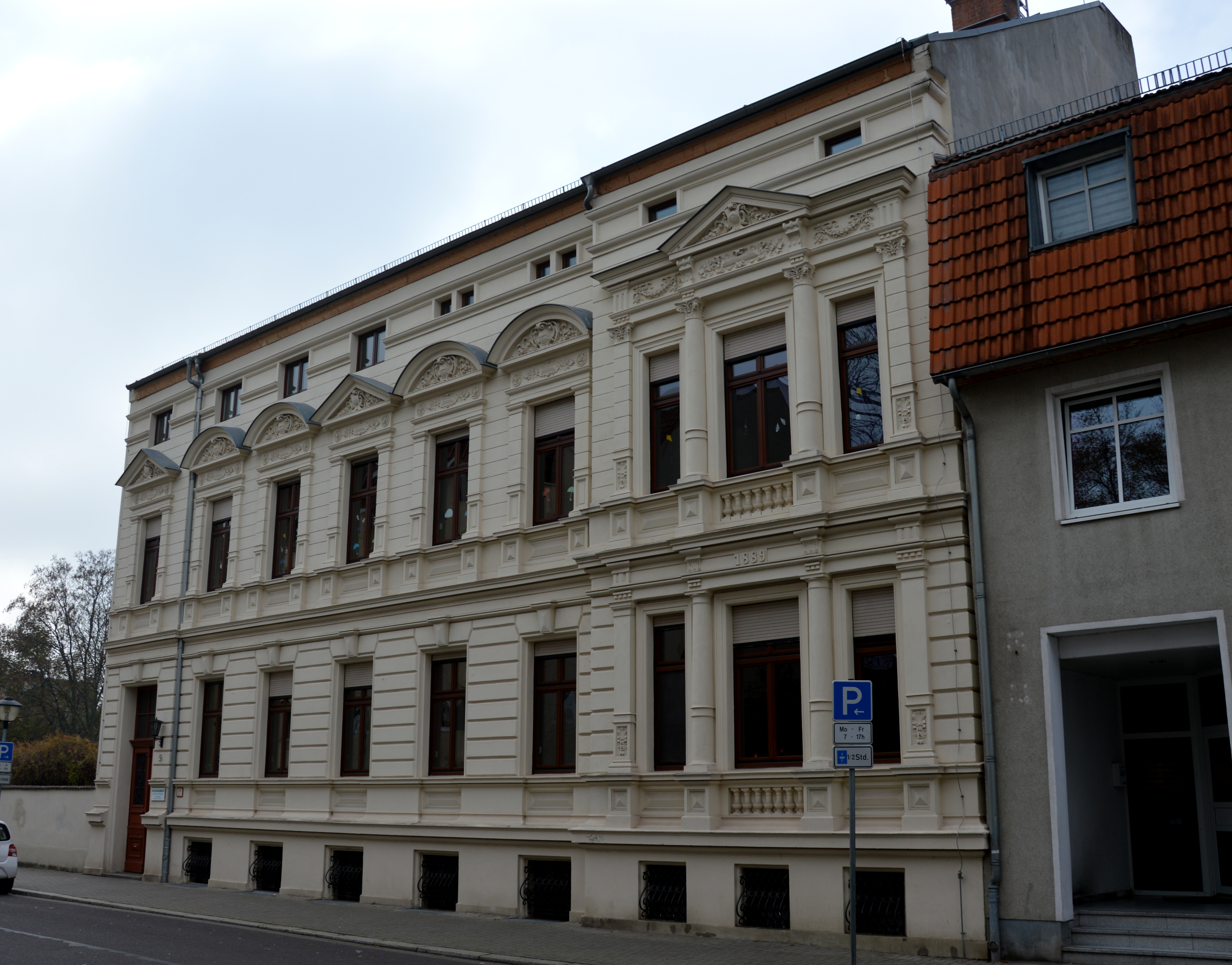 Haus Abendstraße 5 in Magdeburg